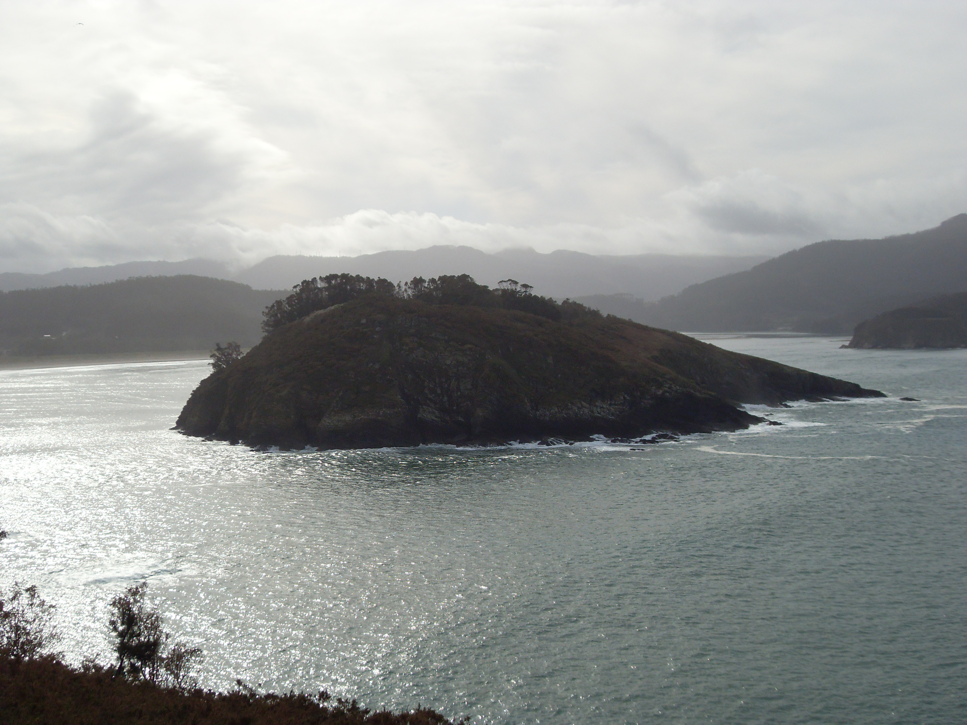 Illa de San Vicente na parroquia de Luama no concello de Ortigueira na entrada da ría. Categoría:Imaxes de Ortigueira